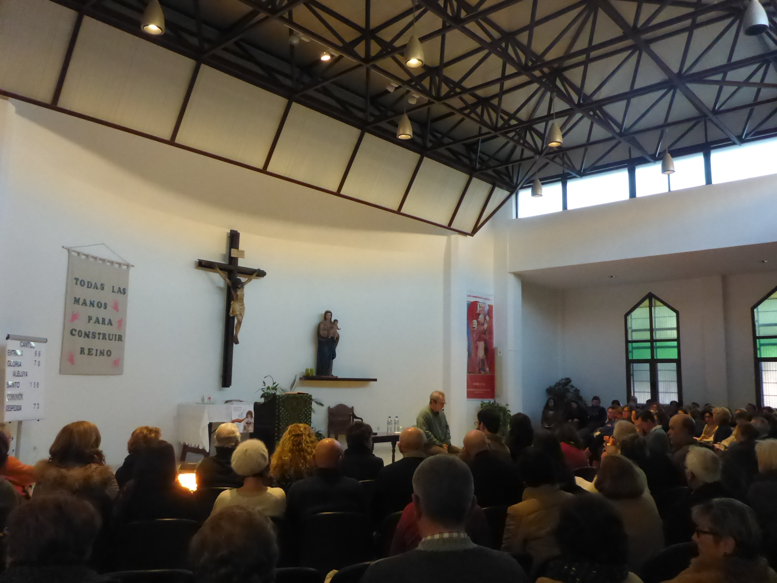 Charla de Pablo d'Ors en la Parroquia San Juan de Dios en Jerez de la Frontera (Andalucía, España)